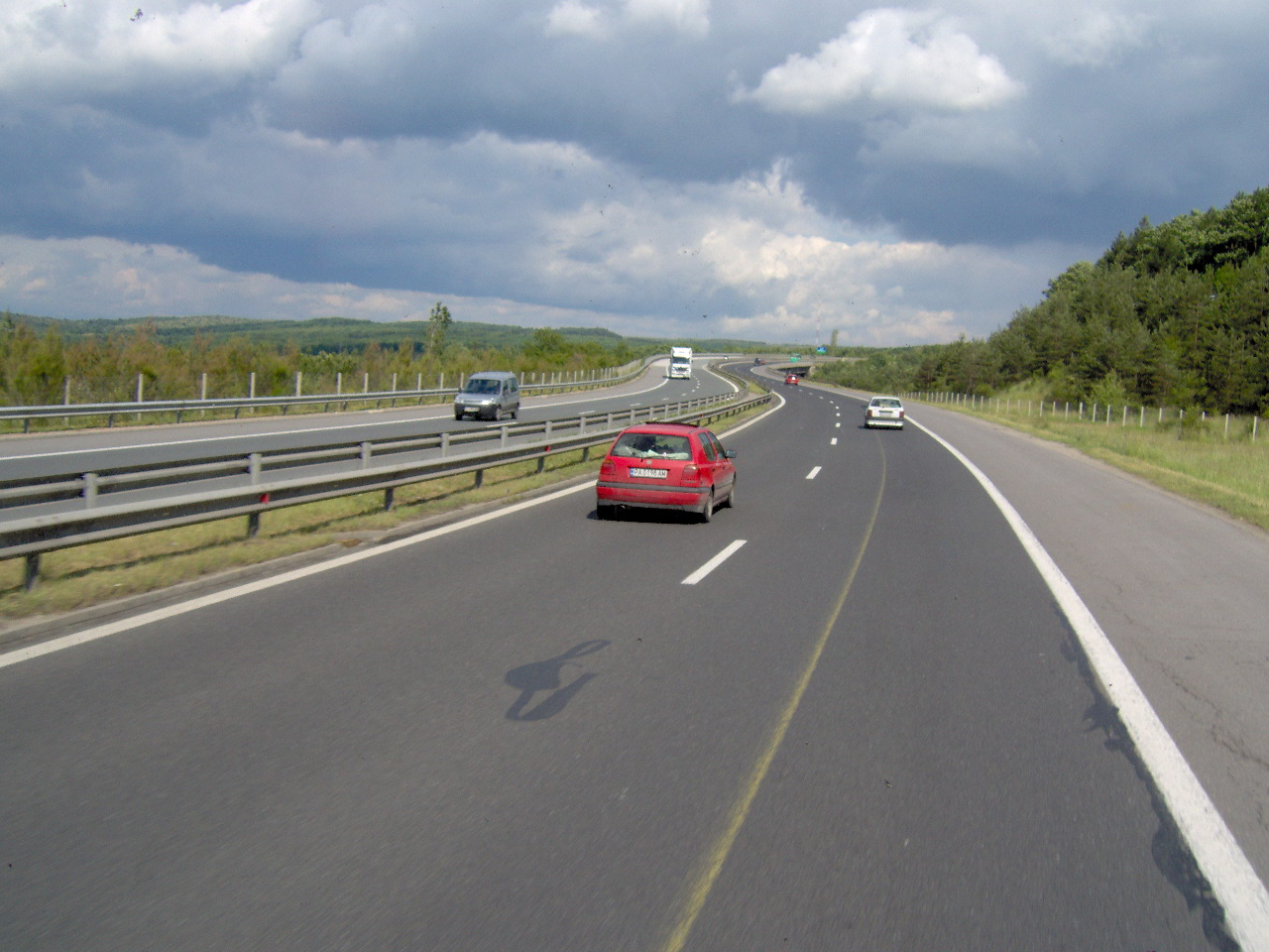 Trakiya highway in Bulgaria.